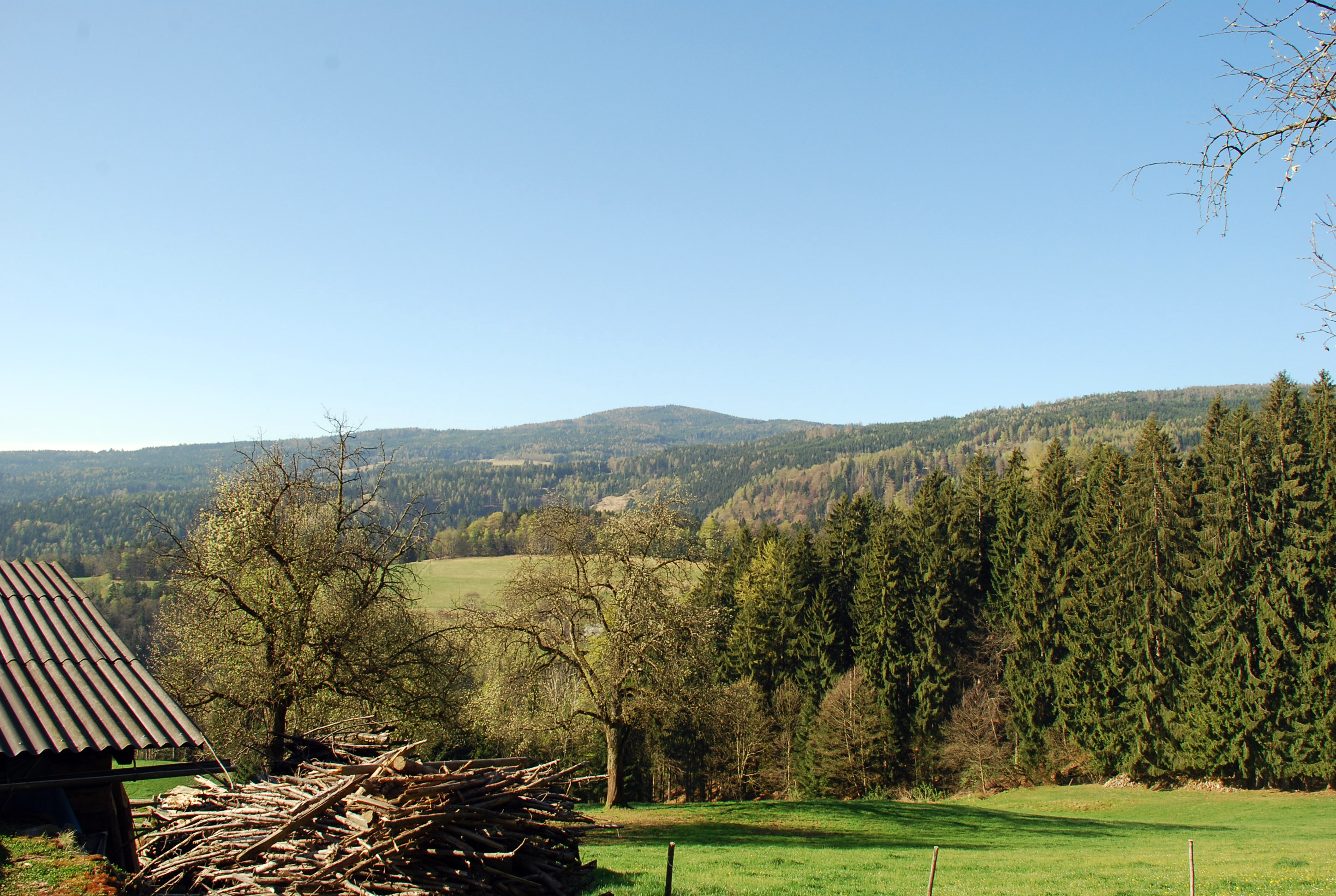 Koralpe, Reinischkogel vom Norden,von der Gemeinde Marhof aus